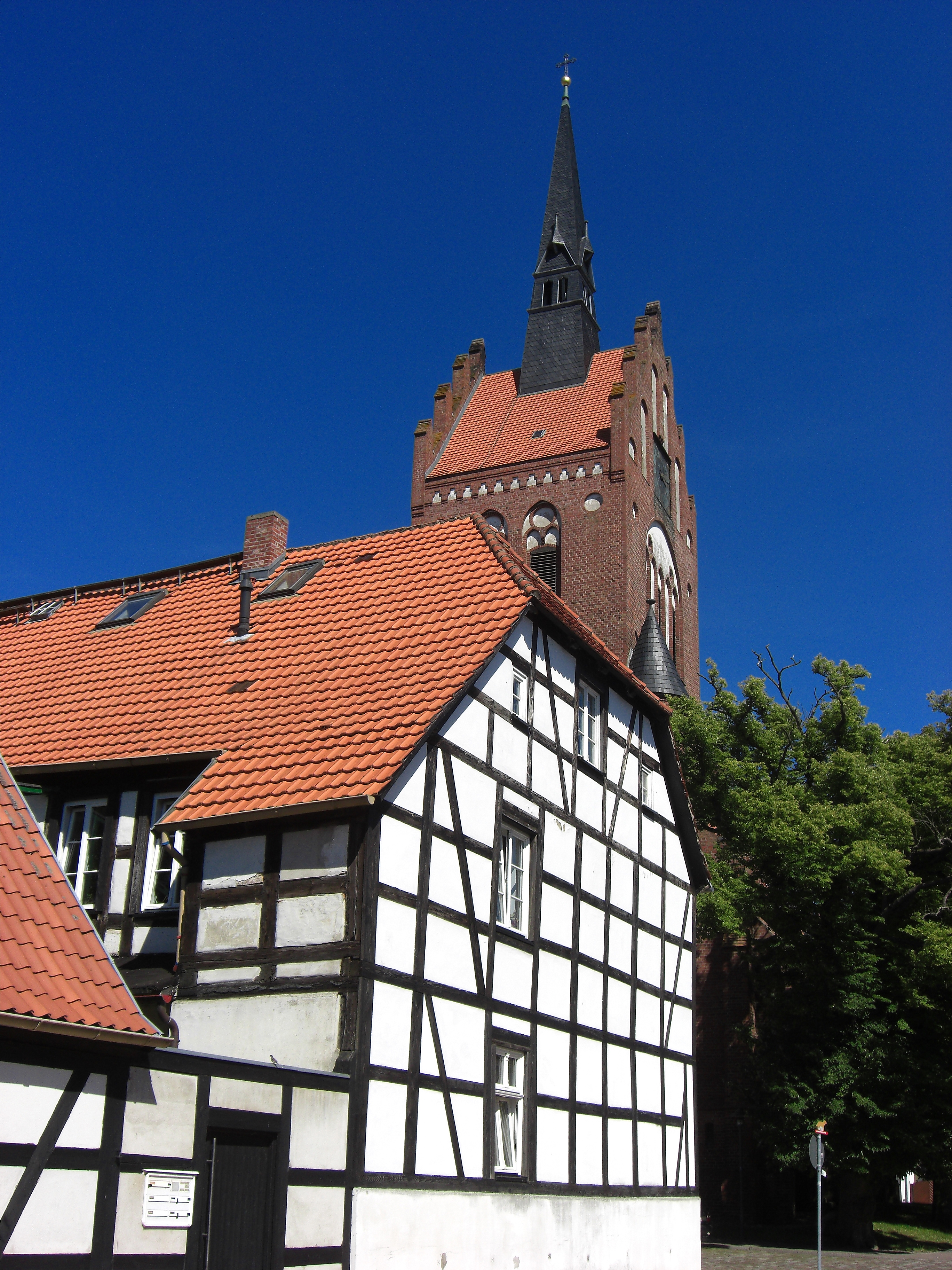 Maison typique du MV.